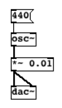 Oscilador